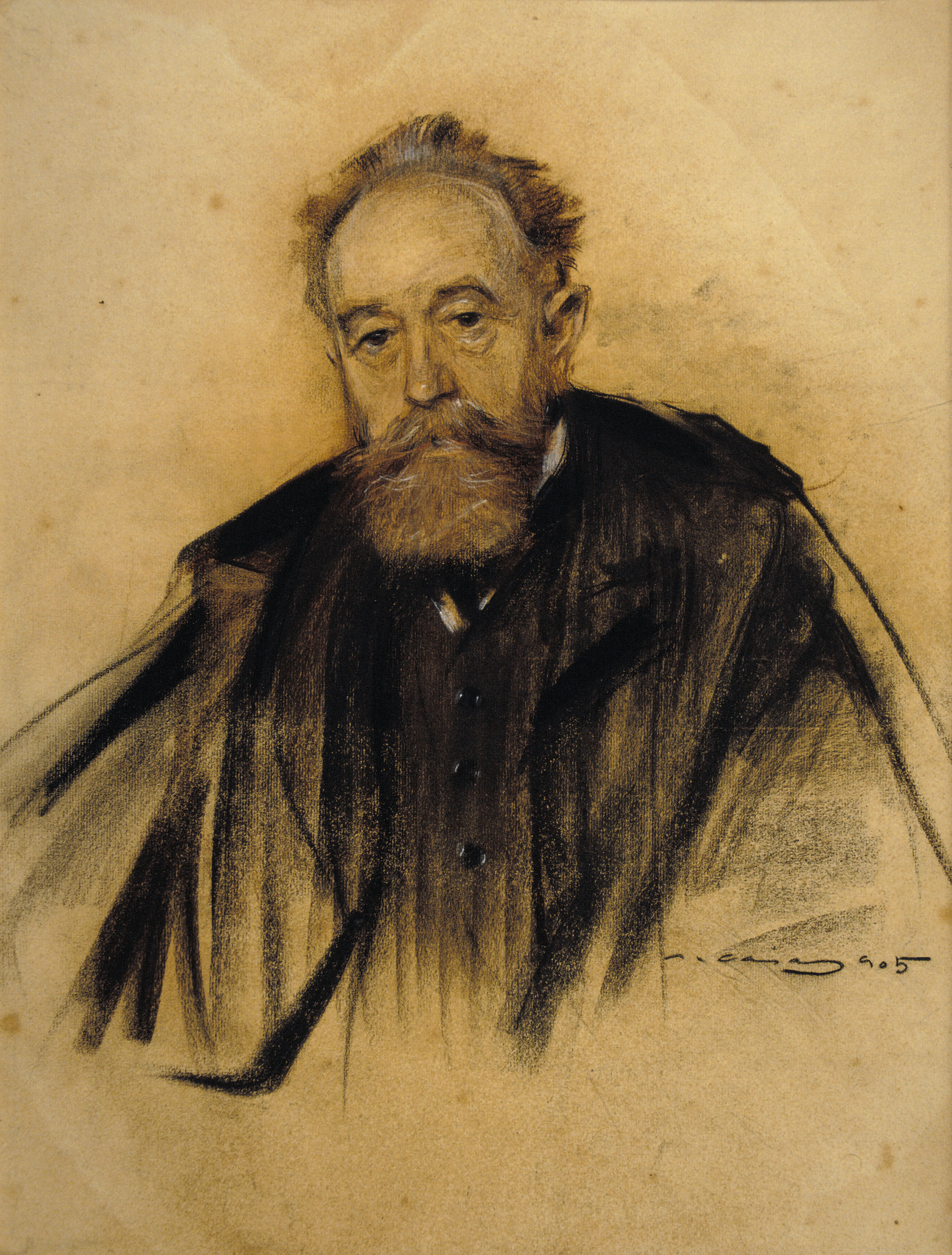 portrait